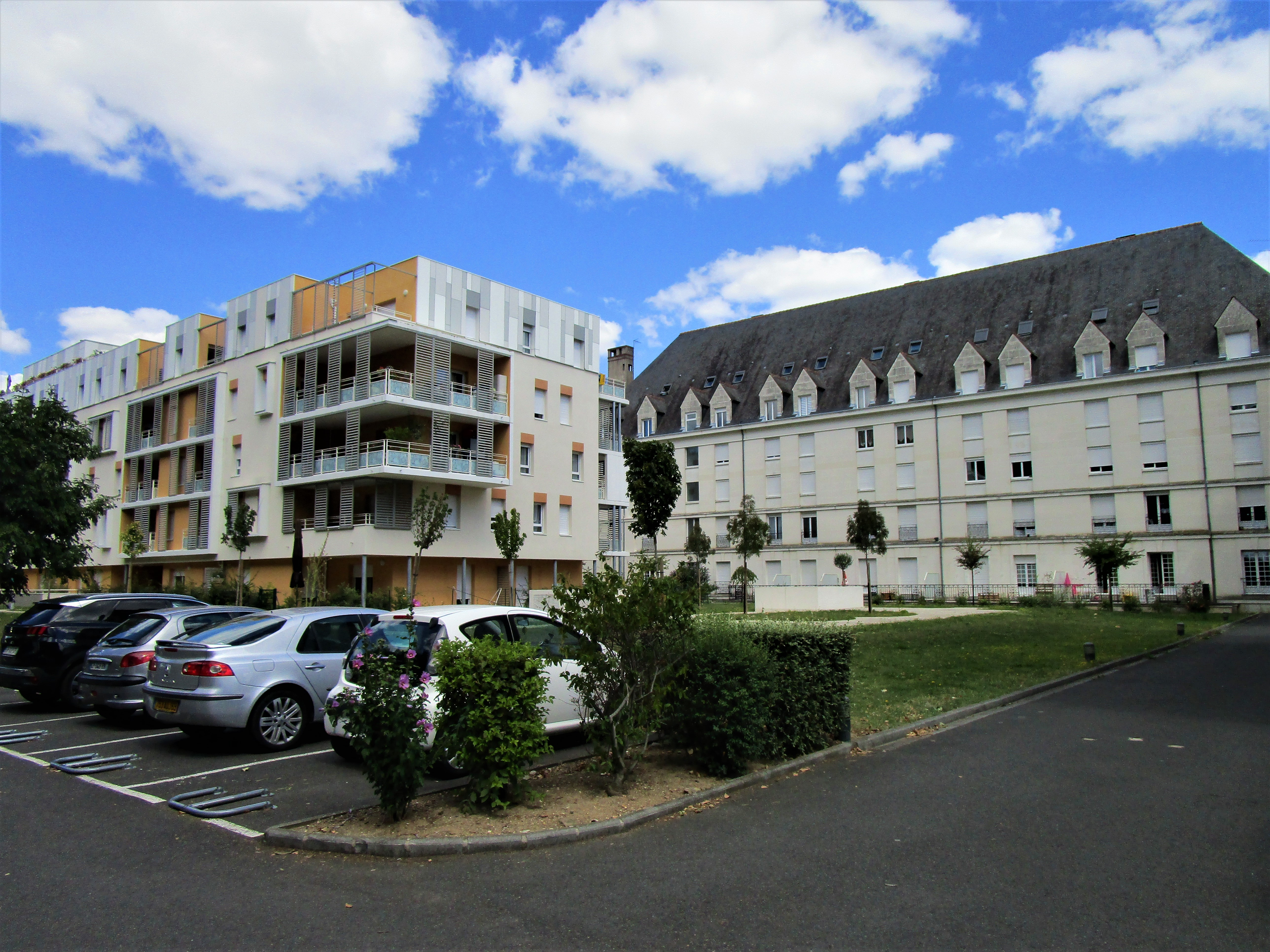 Immeubles dans le secteur de la Belle-Fille, dans le quartier des Fontaines de Tours.